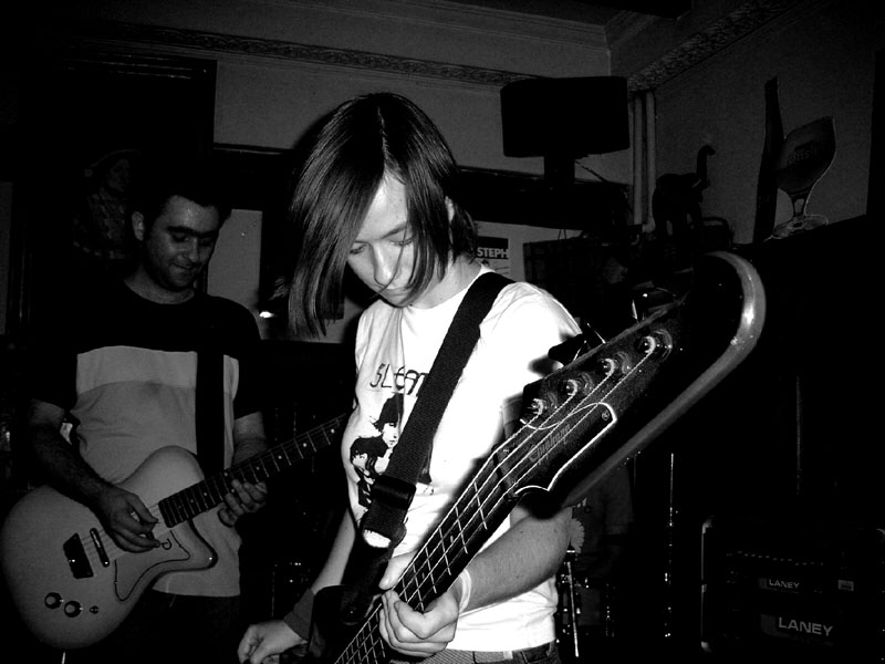 A December Lake live in Café Dada, Brussel. eigen foto.